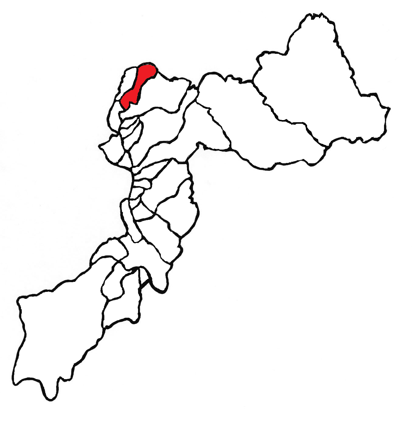 Ubicación del distrito en la provincia de Huancayo, departamento de Junín, Perú